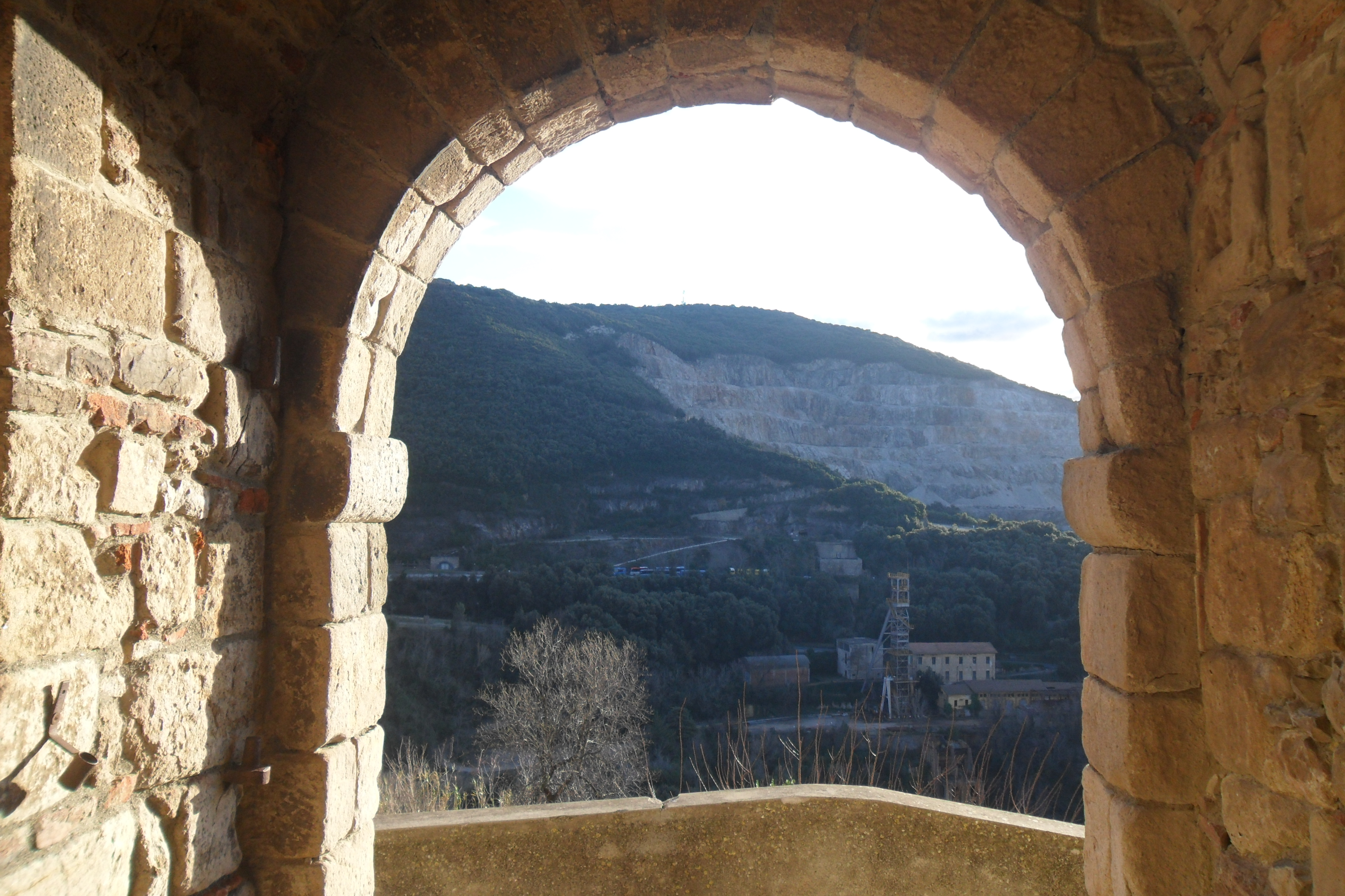 Monte Calvo osservato da Gavorrano